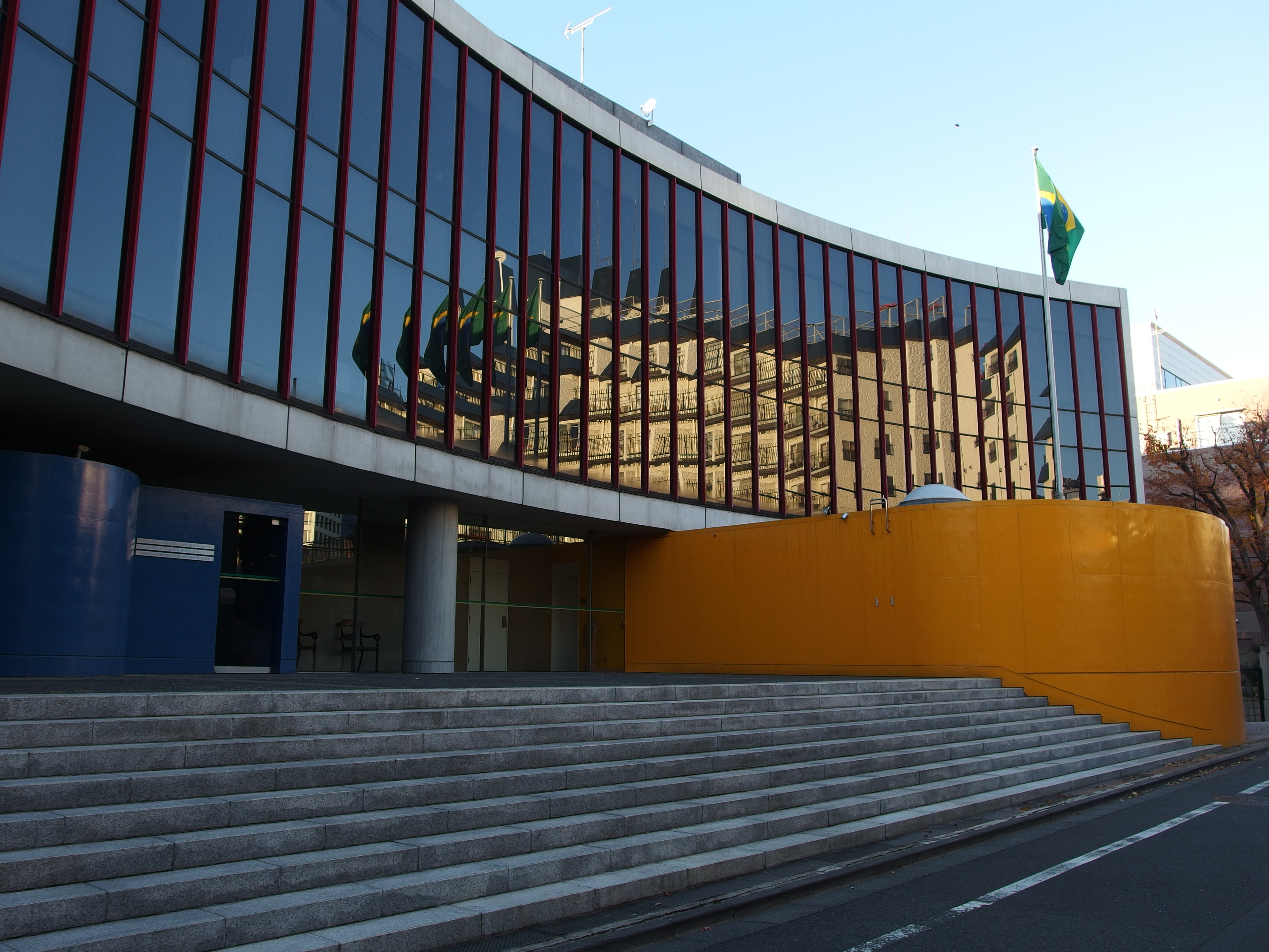 Brazil Embassy @ Aoyama